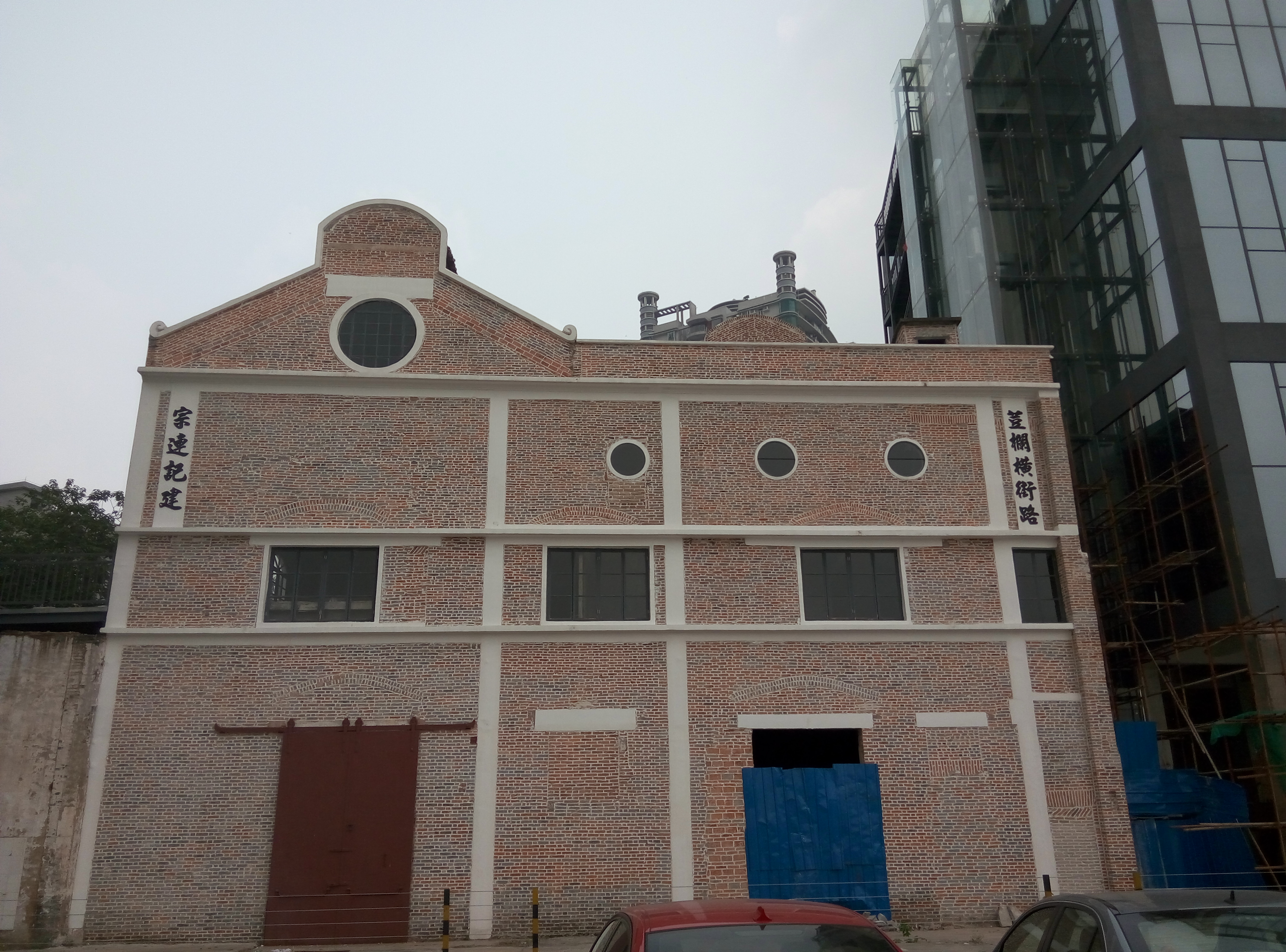 粵語: 鳳凰崗 誠志倉新樣